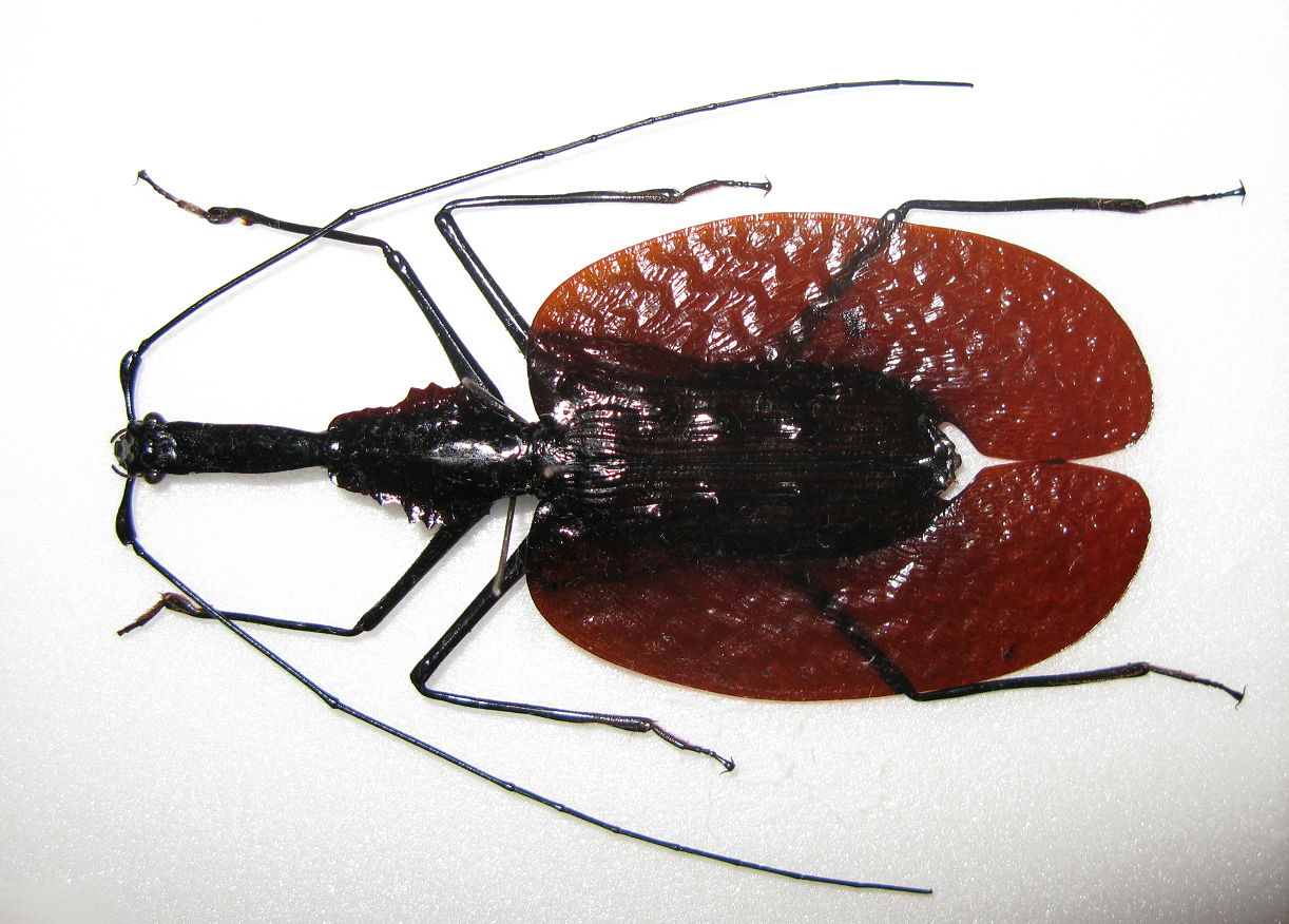 Other verison of Mormolyce phyllodes 2.JPG